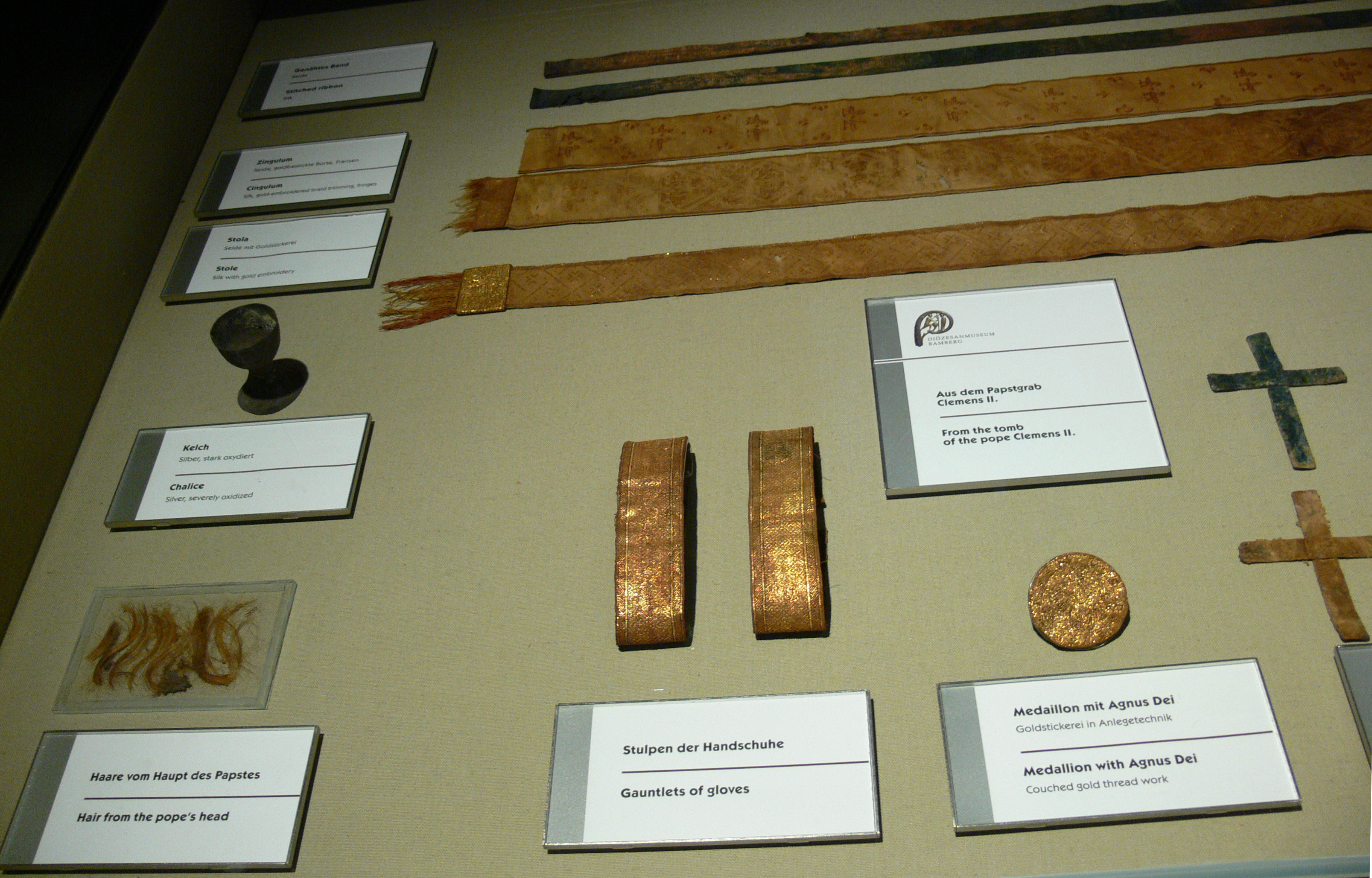 Diözesanmuseum Bamberg Gegenstände aus dem Papstgrab Clemens II.